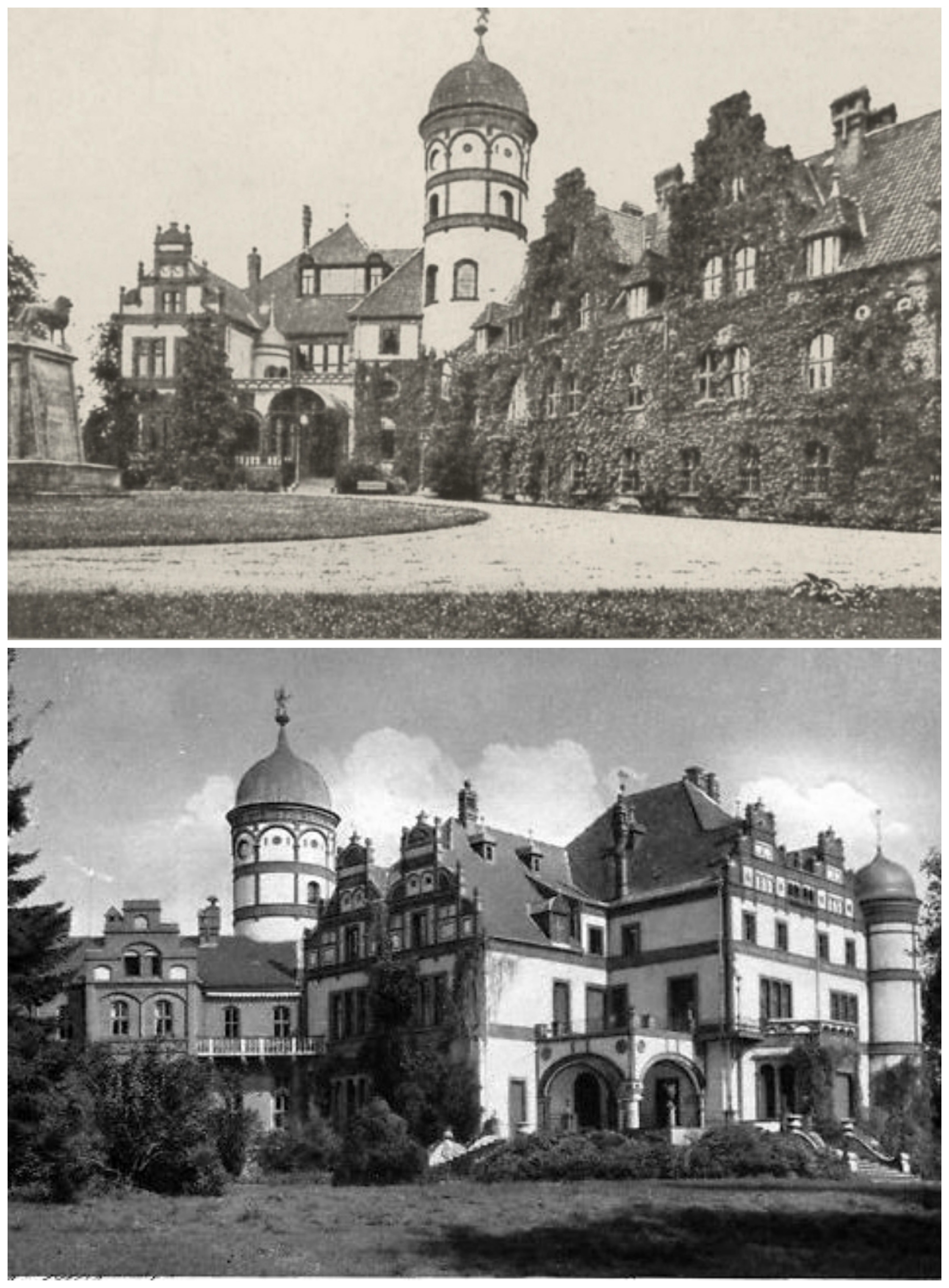 Ansicht Schloss Wiligrad, Parkanlage und Gartenanlage am Schloss